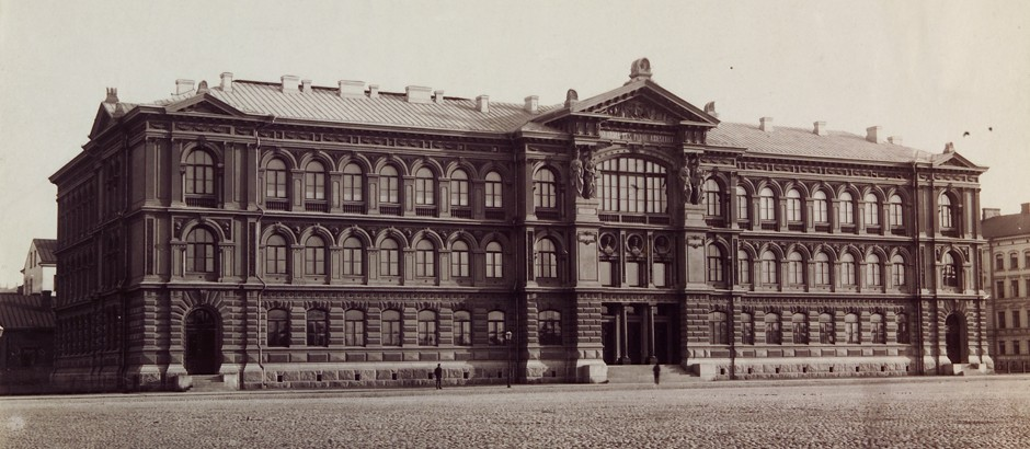 Здание Атенеума в Хельсинки